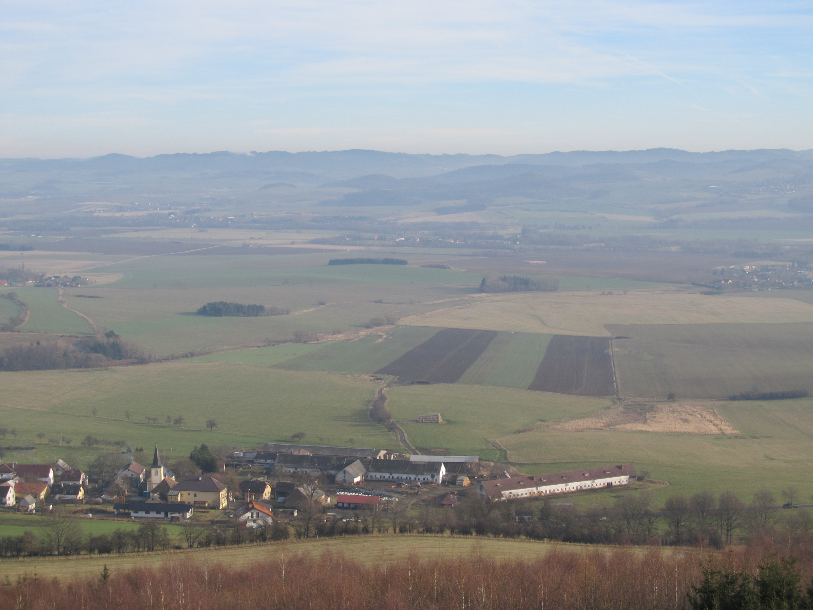 Dlažov a hřeben Baráku z rozhledny